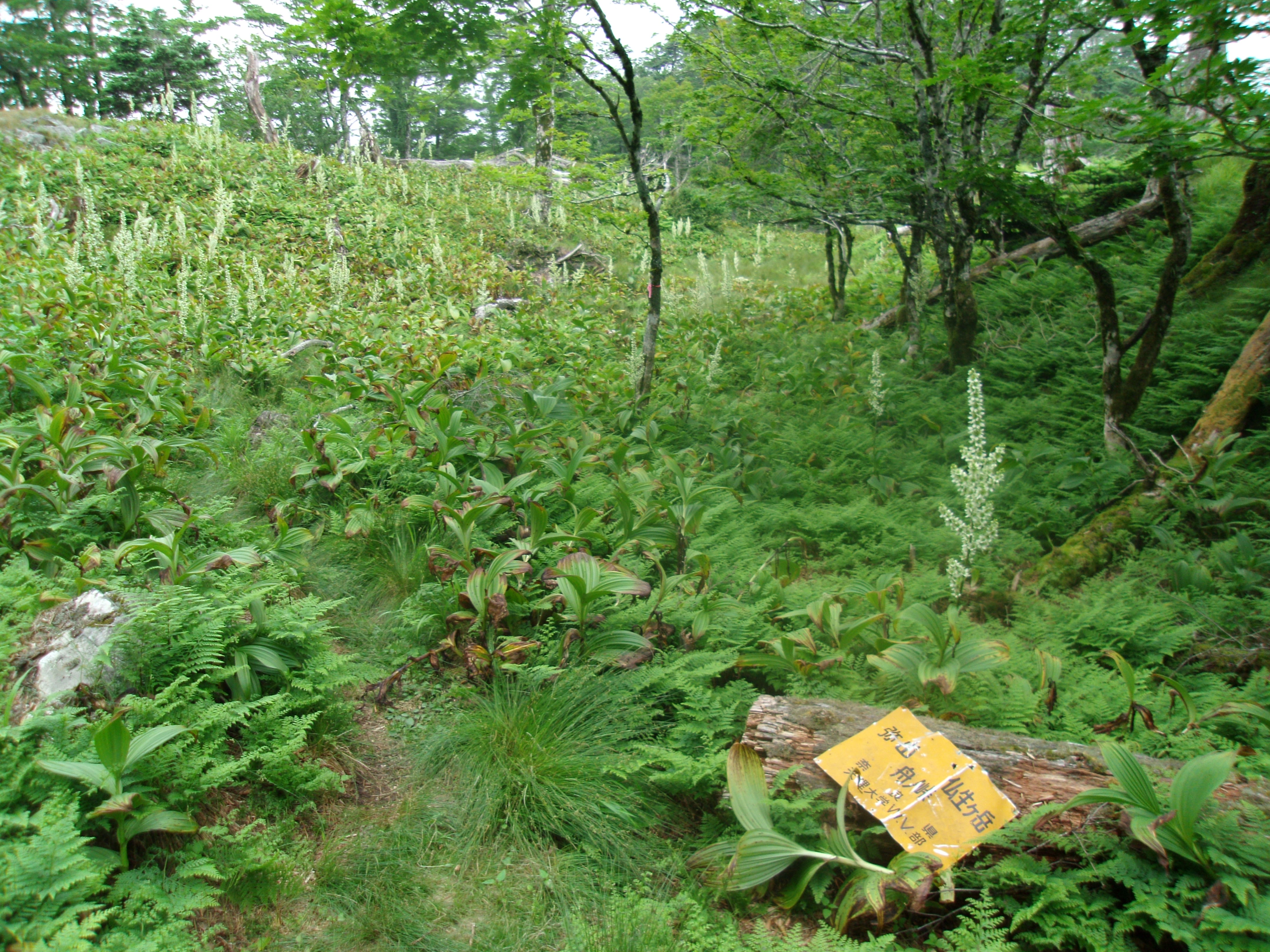 大峯奥駈道第46靡「舟の多和（舟ノ垰）」